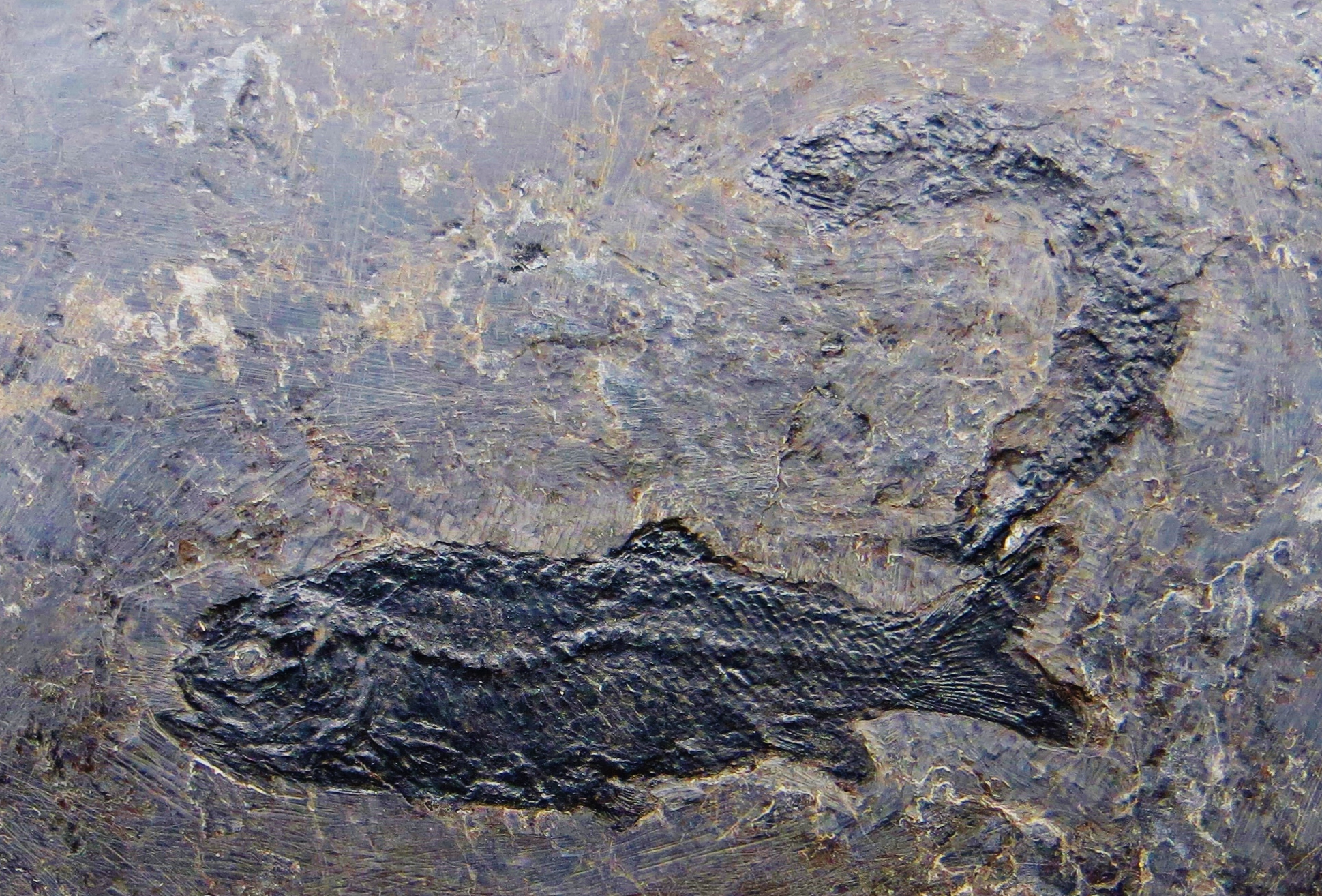 Fossil of Pholidophorus, an extinct fish- Took the picture at Museo di Storia naturale “Antonio Stoppani” - Venegono Inferiore